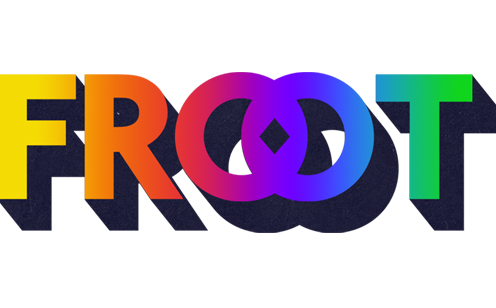 FROOT